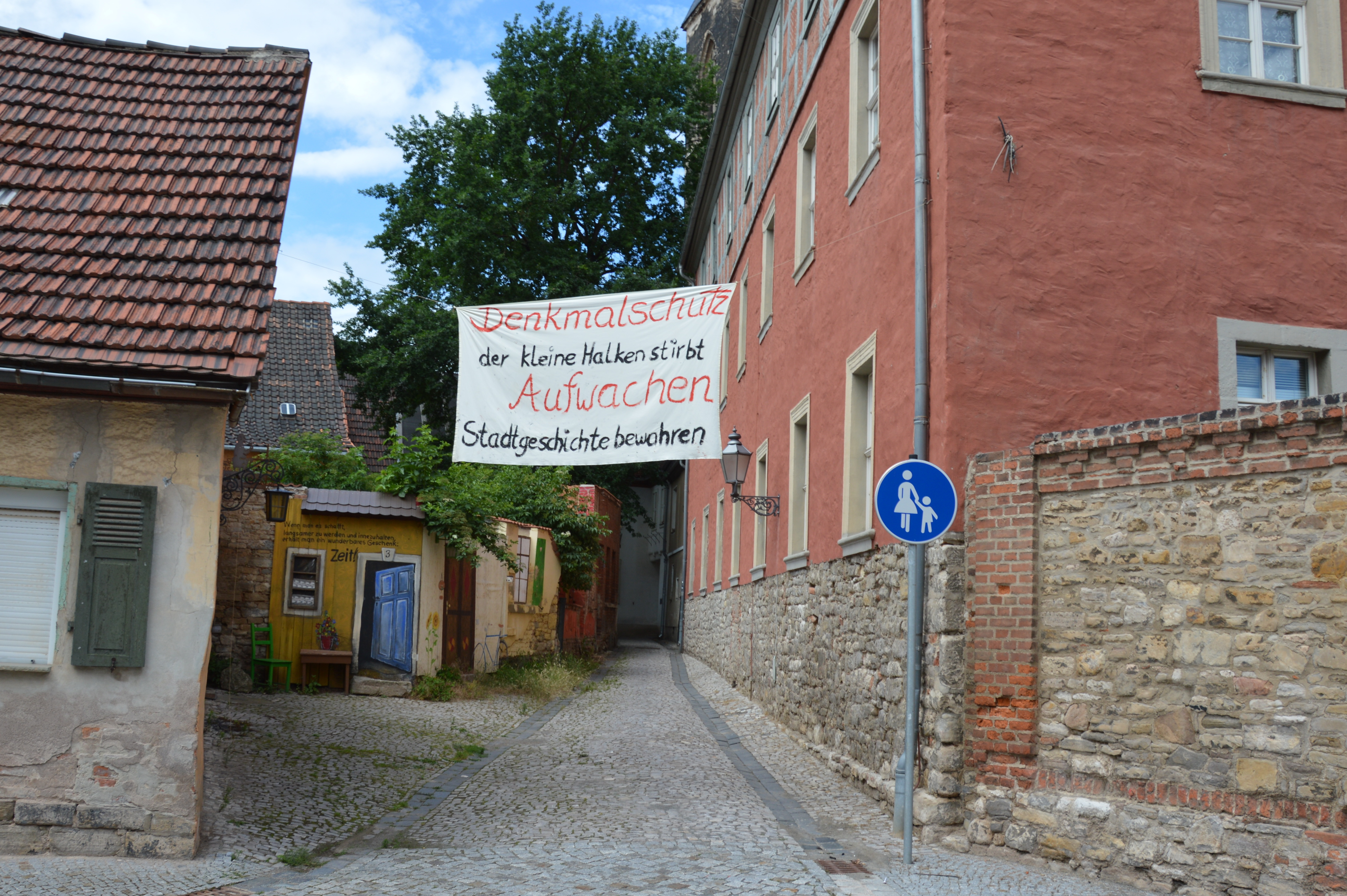 Transparent über dem Kleinen Halken in Aschersleben